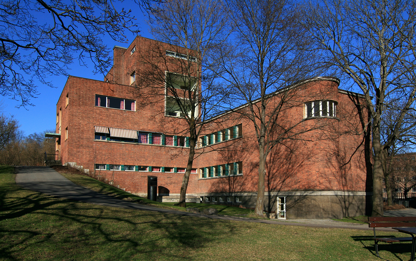 Svein Rosselands hus (astrofysikkbygningen), Sem Selands vei 13, Blindern, Oslo. Bygd 1932-37; arkitekt Finn Bryn og Johan Ellefsen.